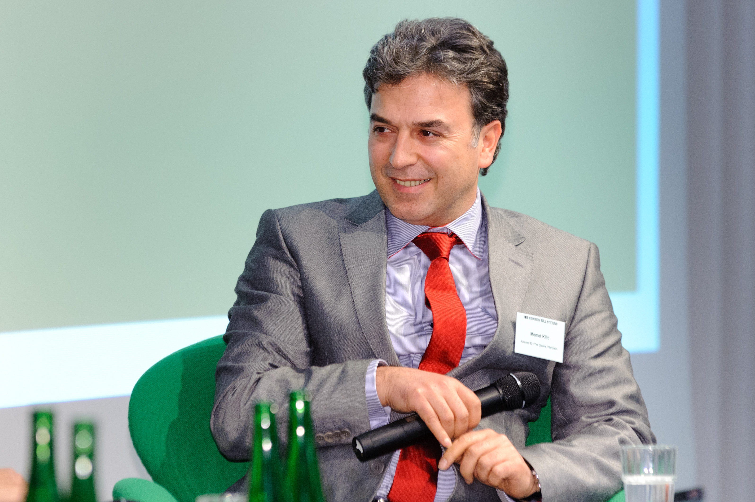 Memet Kilic, Bündnis 90 / Die Grünen Foto: Stephan Röhl